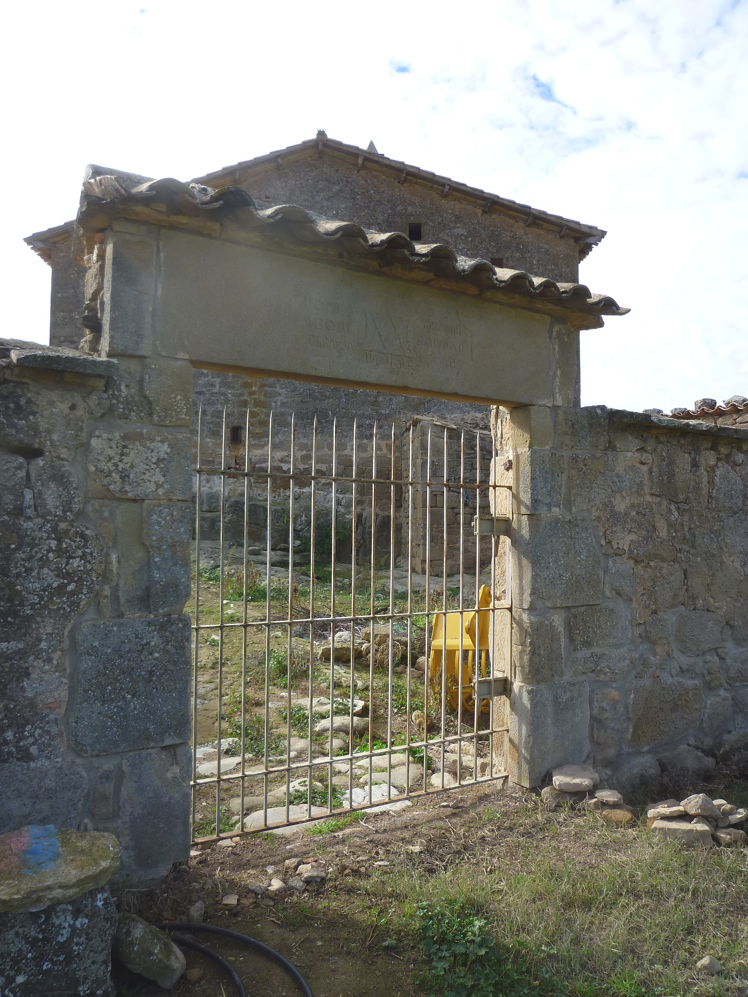 Mas de la Coromina (Biosca): Baluard. Al dintell una inscripció sembla dir: "JOAN COROMINA Y COLL FEU FER EL BALUART Y CORTS ANO 1863"